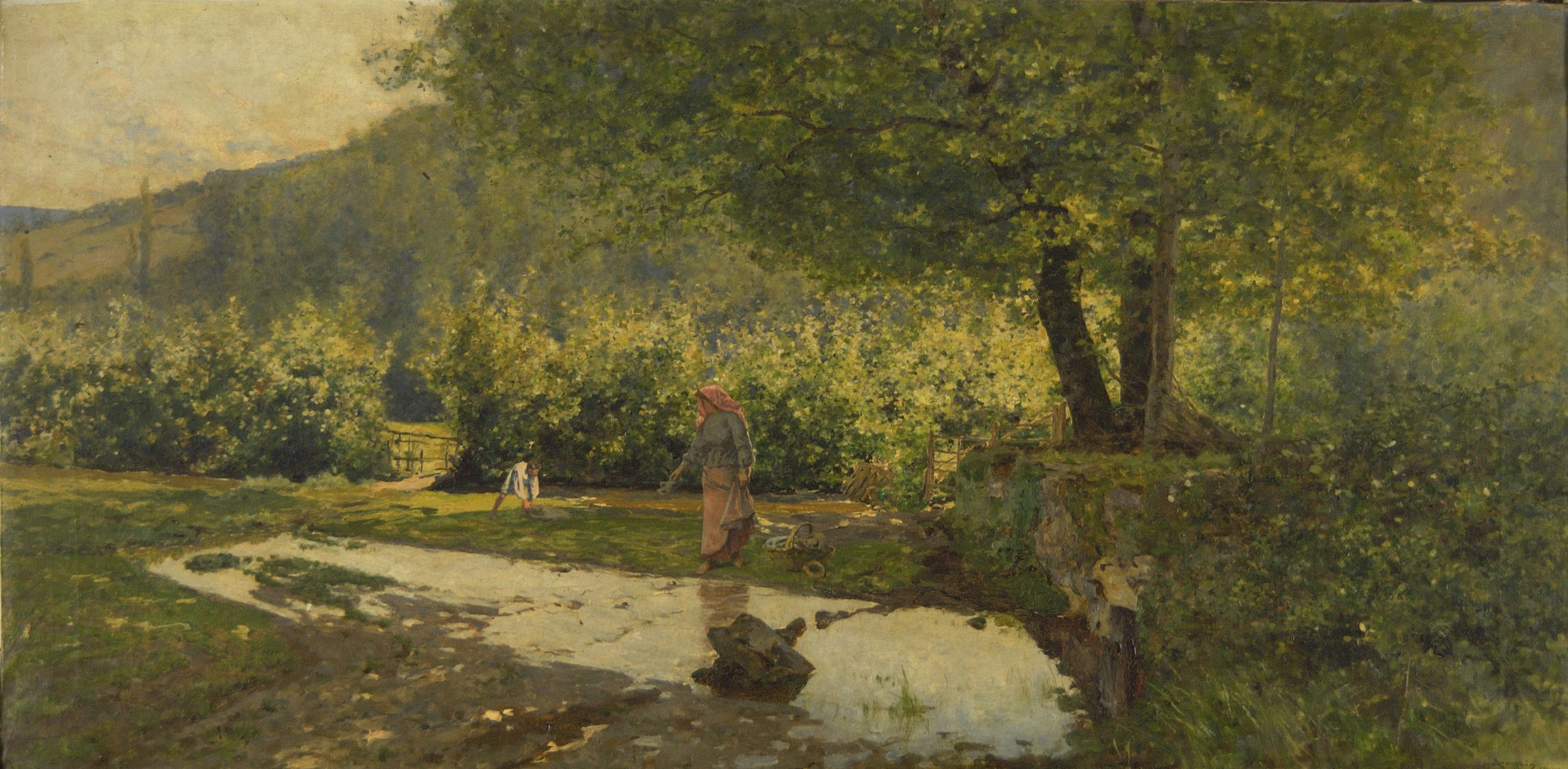 Paisaxe con campesina